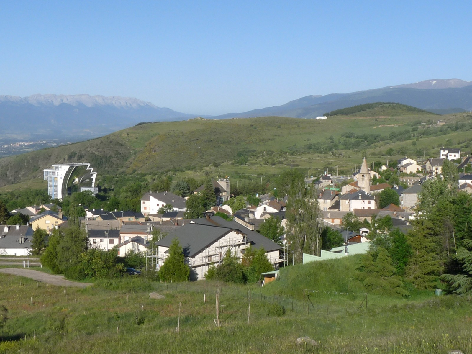 Vue sur Odeillo et le four solaire, Font-Romeu, Pyrénées-Orientales, France